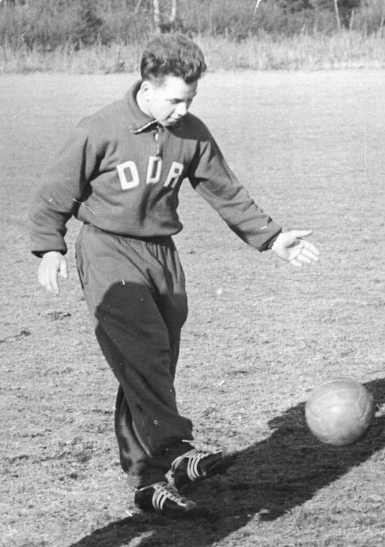 Zentralbild-Beyer Bey-Sch. 23.3.56 DDR-Jugendauswahl für FIFA-Jugendturnier - In der Zeit vom 28. März bis zum 2. April 1956 findet in der ungarischen Hauptstadt Budapest das FIFA-Jugendturnier statt. Die DDR-Auswahlmannschaft wurde in den letzten Tagen in der Sportschule Strausberg zusammengezogen und bereitet sich unter der bewährten Leitung der beiden Trainer Belger und Böning auf die kommende Aufgabe vor. UBz.: Neben dem Konditionstraining nimmt die praktische Arbeit einen großen Raum des Vorbereitungsprogramms ein. Albrecht Strohmeyer während des Training.